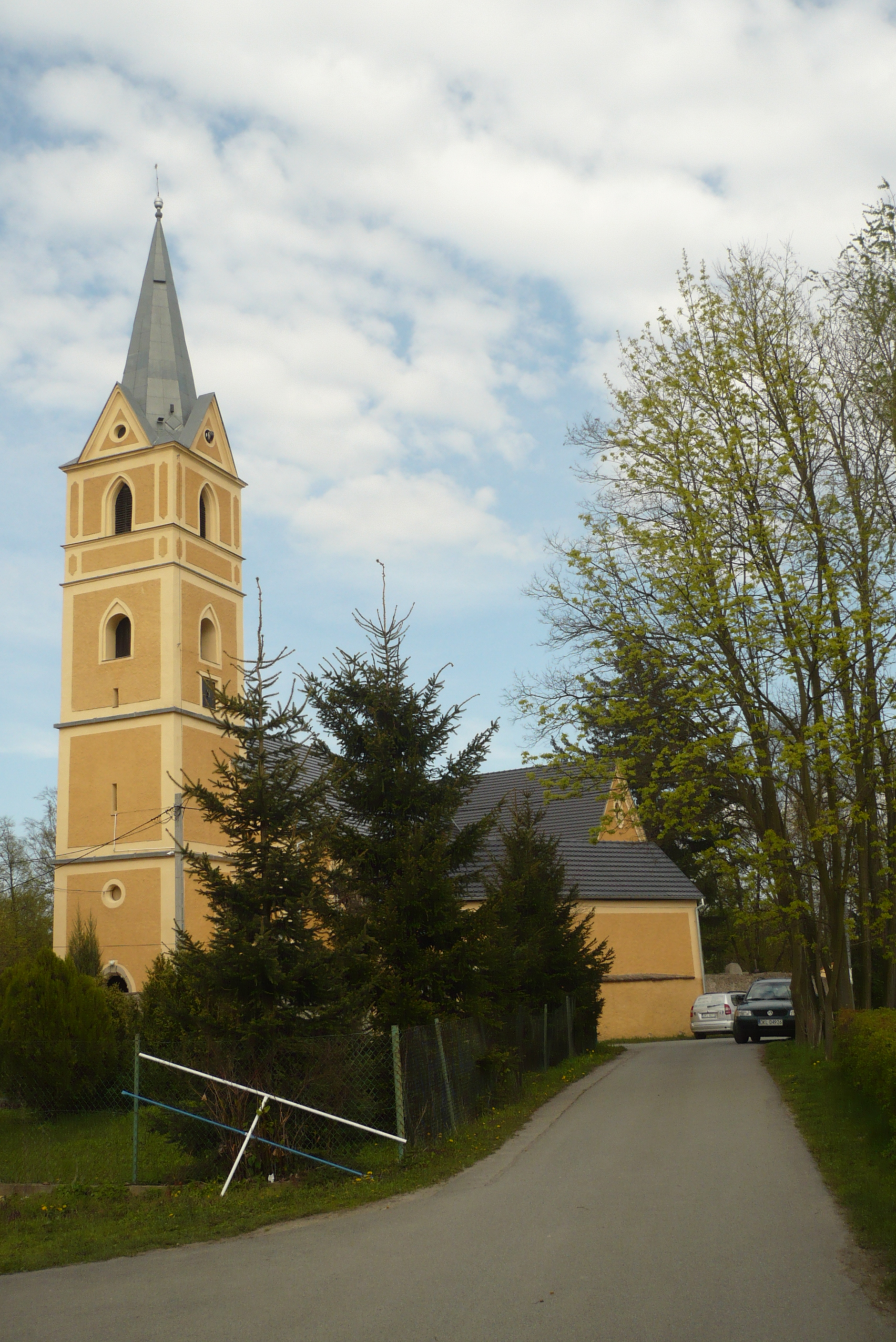 Kościół w Piszkowicach